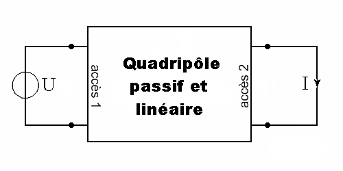 Schéma électrique d'explication